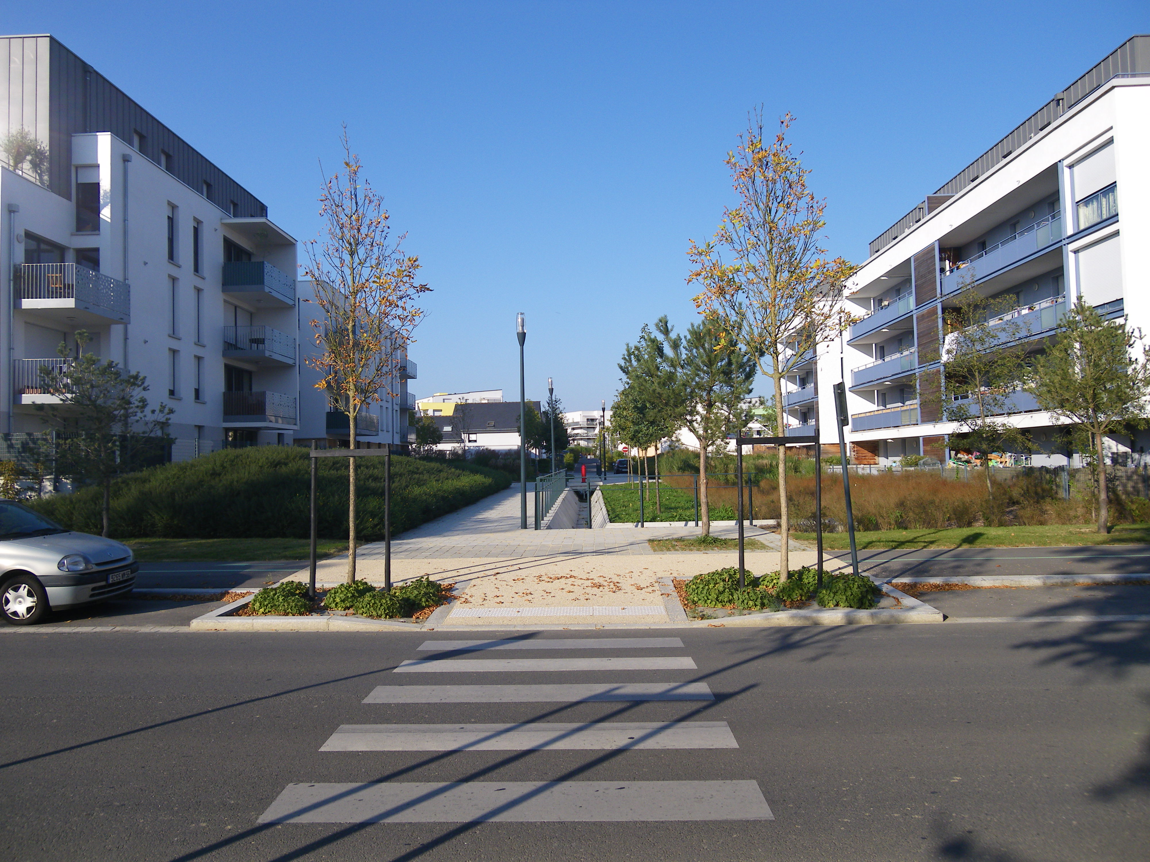 chantepie